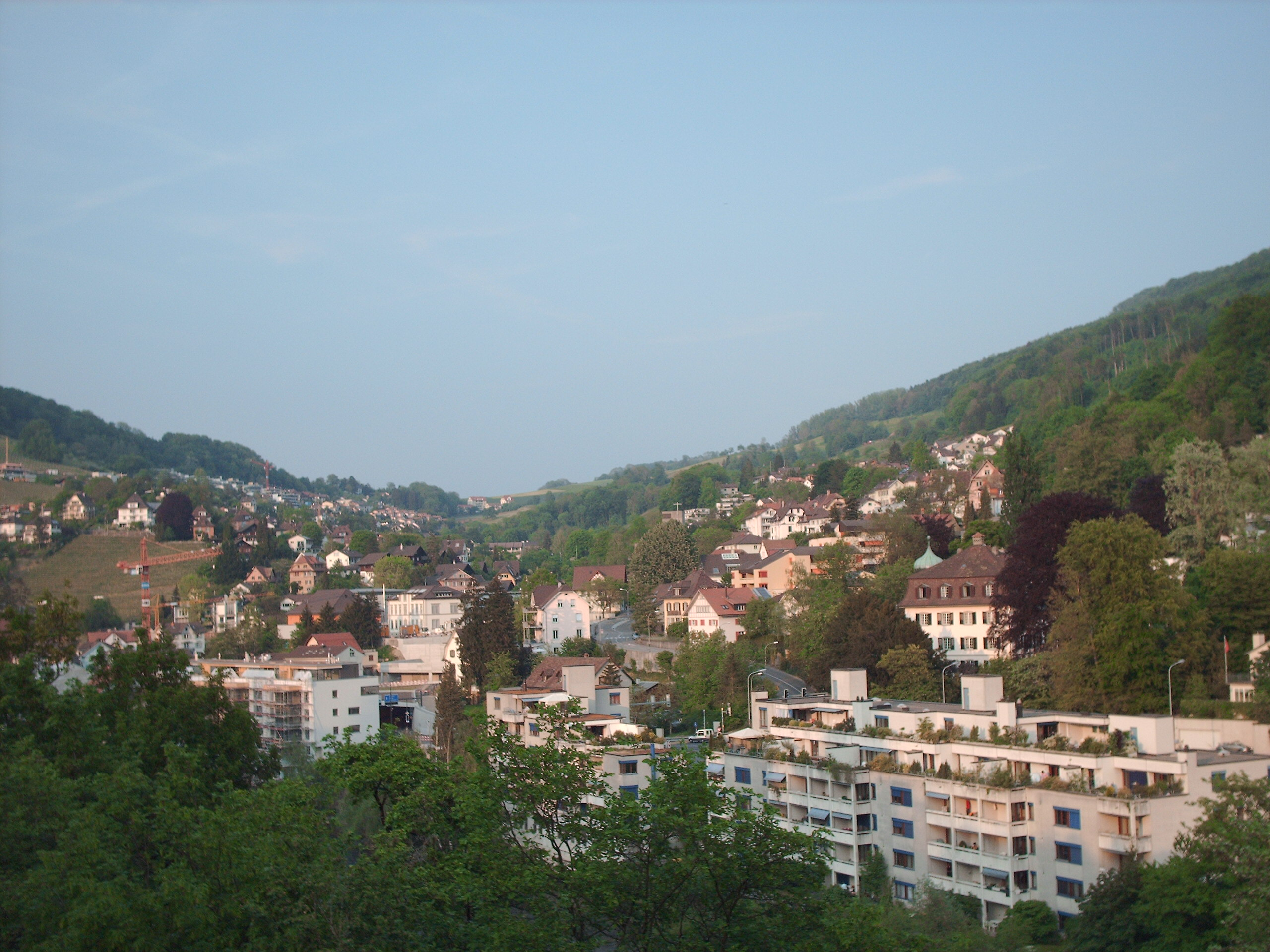 Ennetbaden seen from Baden